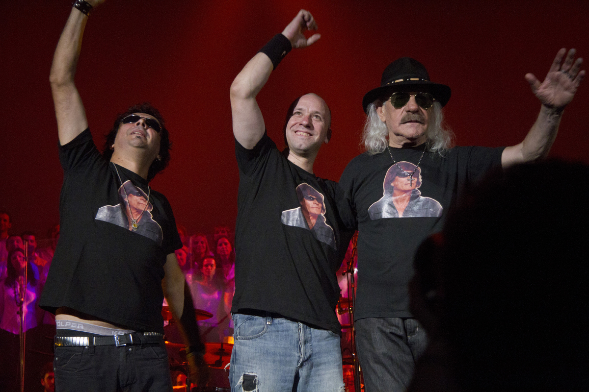 (Foto: Estrella Herrera)